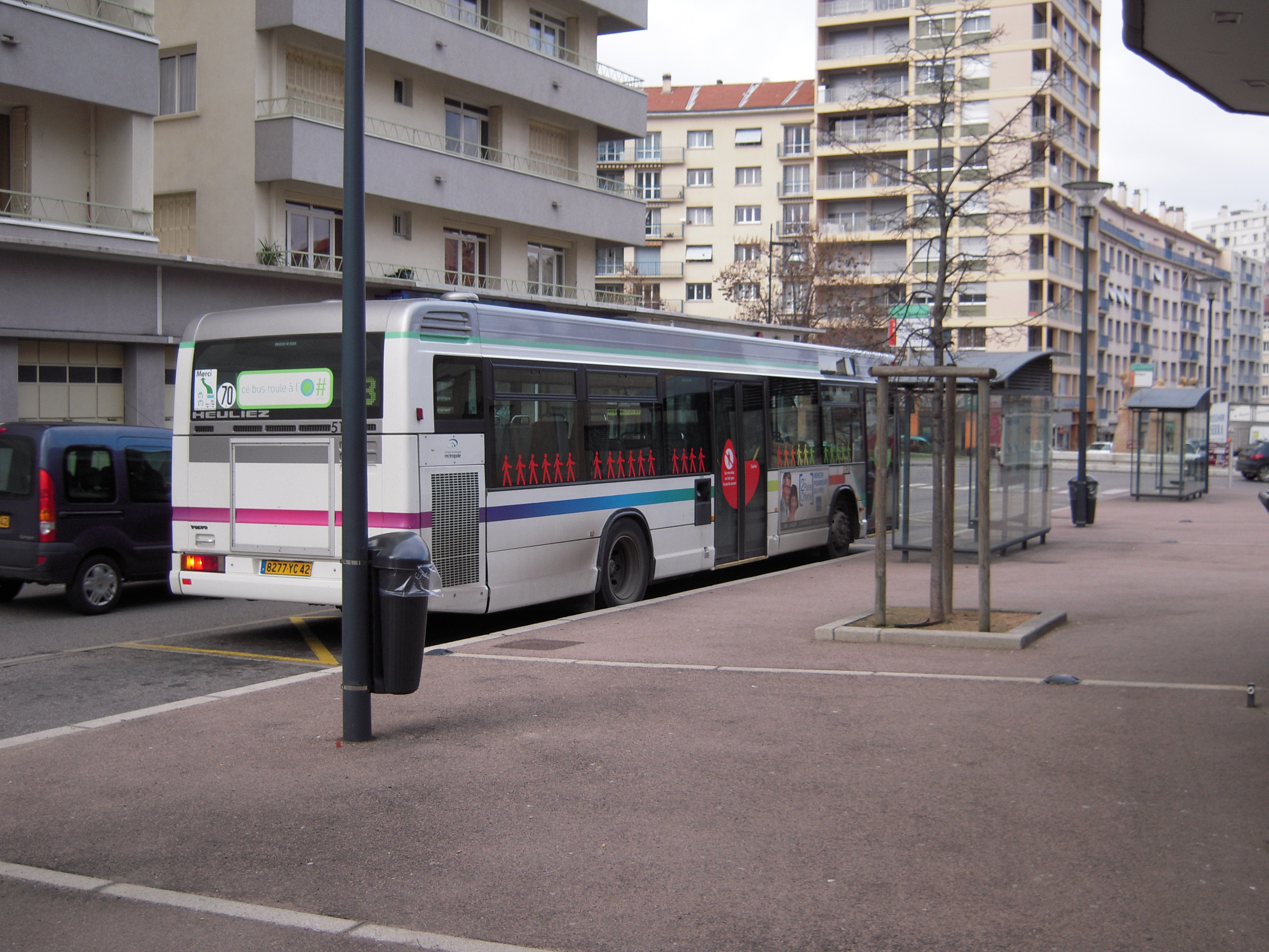 Bus du réseau STAS de St Etienne Métropole stationné place du Moulin à ST CHAMOND